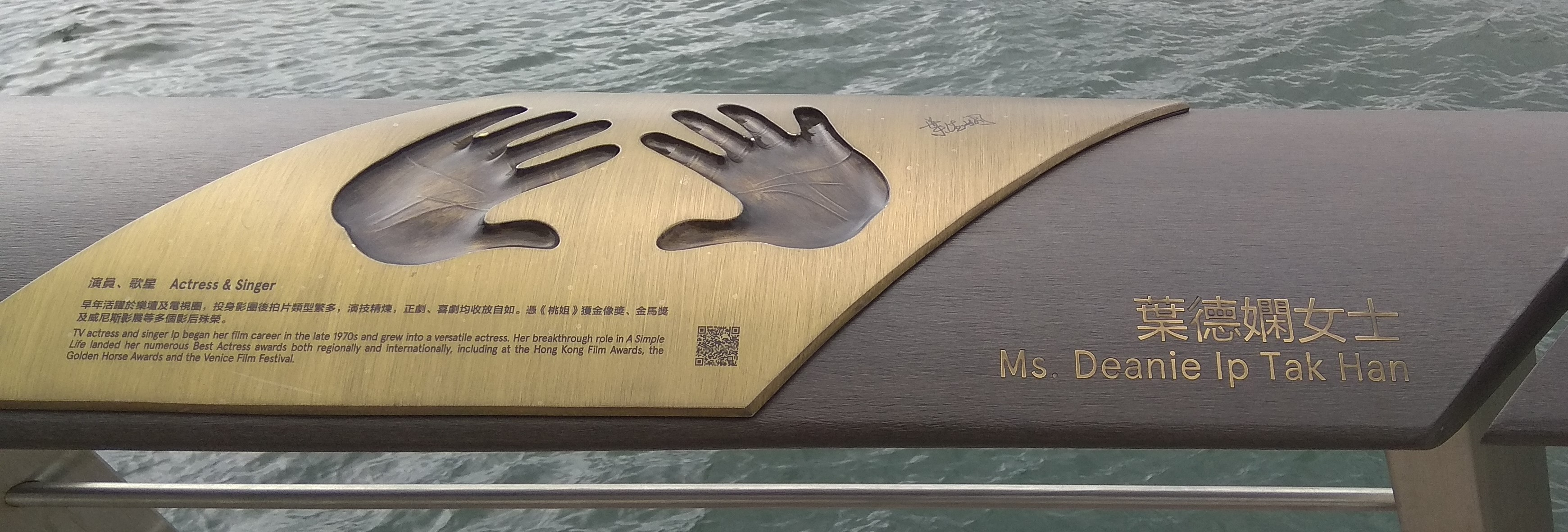 香港尖沙咀星光大道上葉德嫻的手印及簽名（編號：102）。